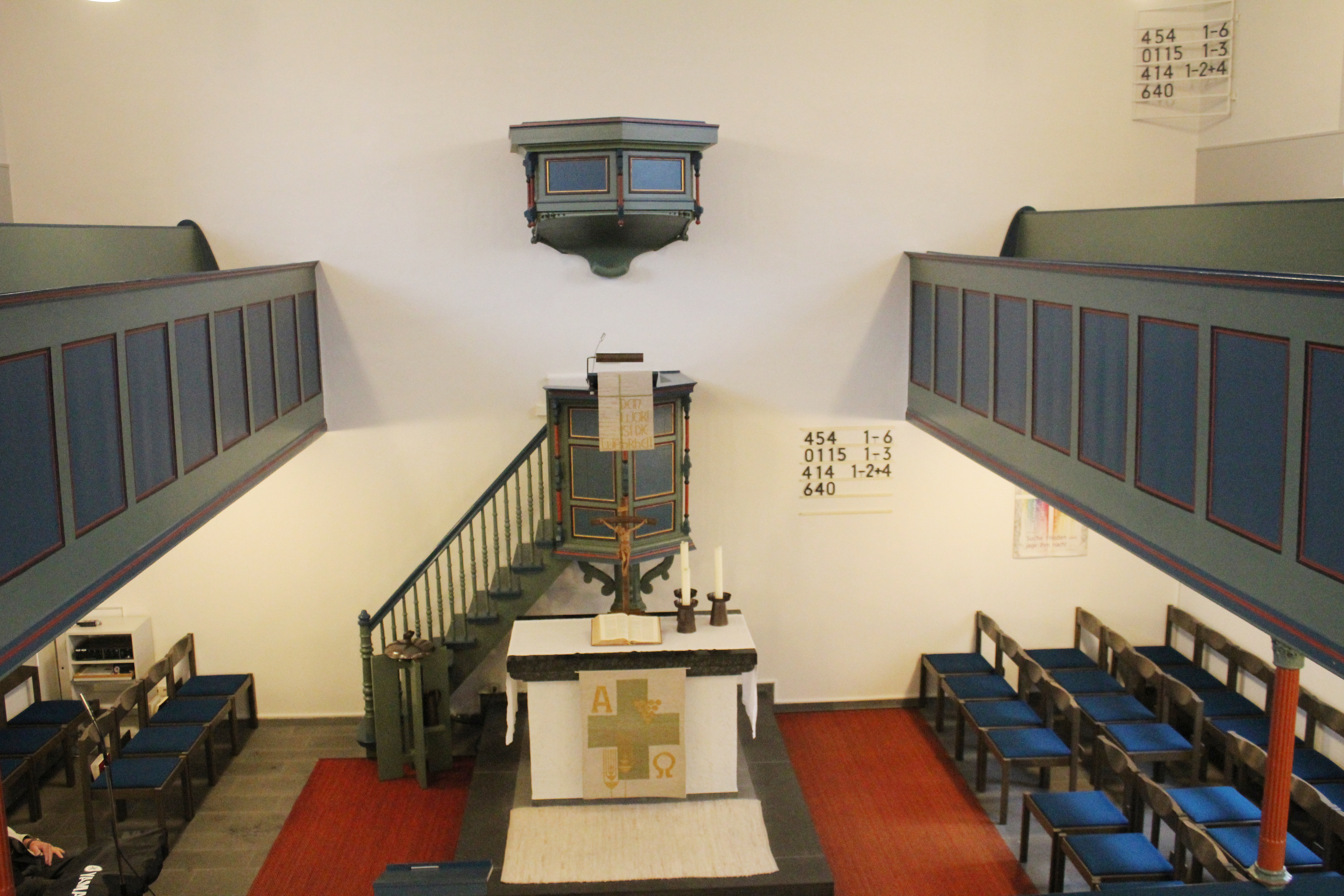 Evangelische Kirche Oberdieten, Breidenbach, Landkreis Marburg-Biedenkopf, Hessen, Deutschland